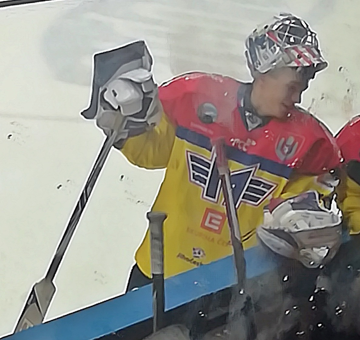 HC Zubr Přerov - ČEZ Motor České Budějovice